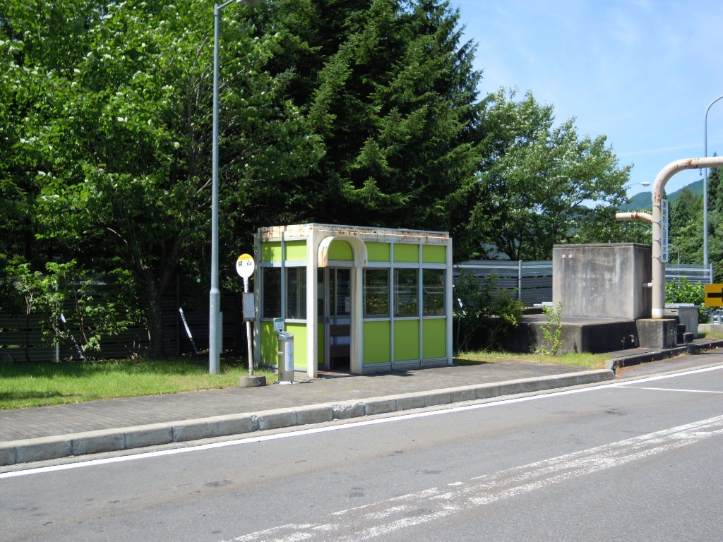 東北自動車道田山パーキングエリアに設置されている田山バスストップ（下り線側）